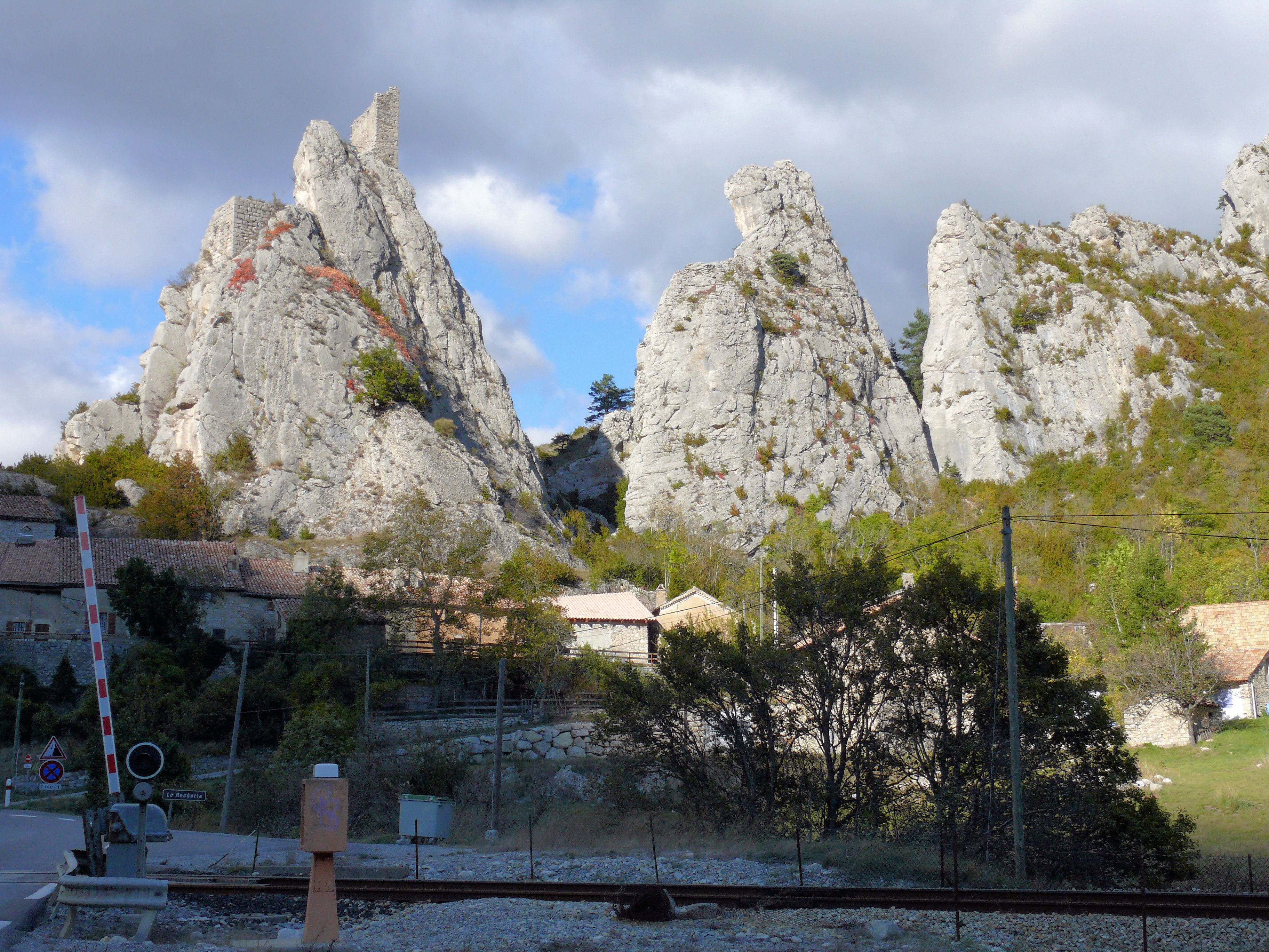 Saint-Julien-en-Beauchêne - Hameau de la Rochette et la ligne de chemin de fer des Alpes